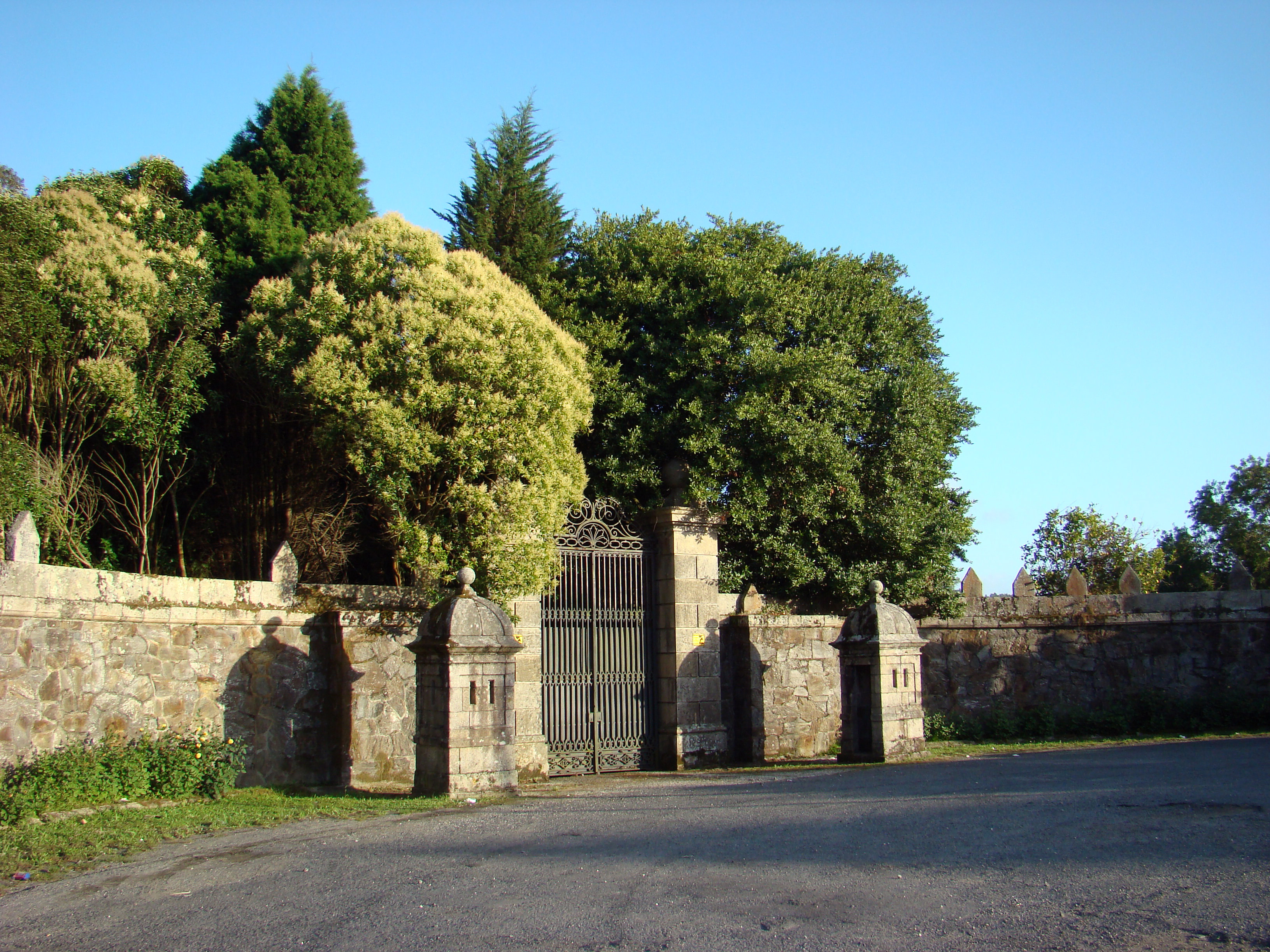 Porta do Pazo de Meirás, Sada